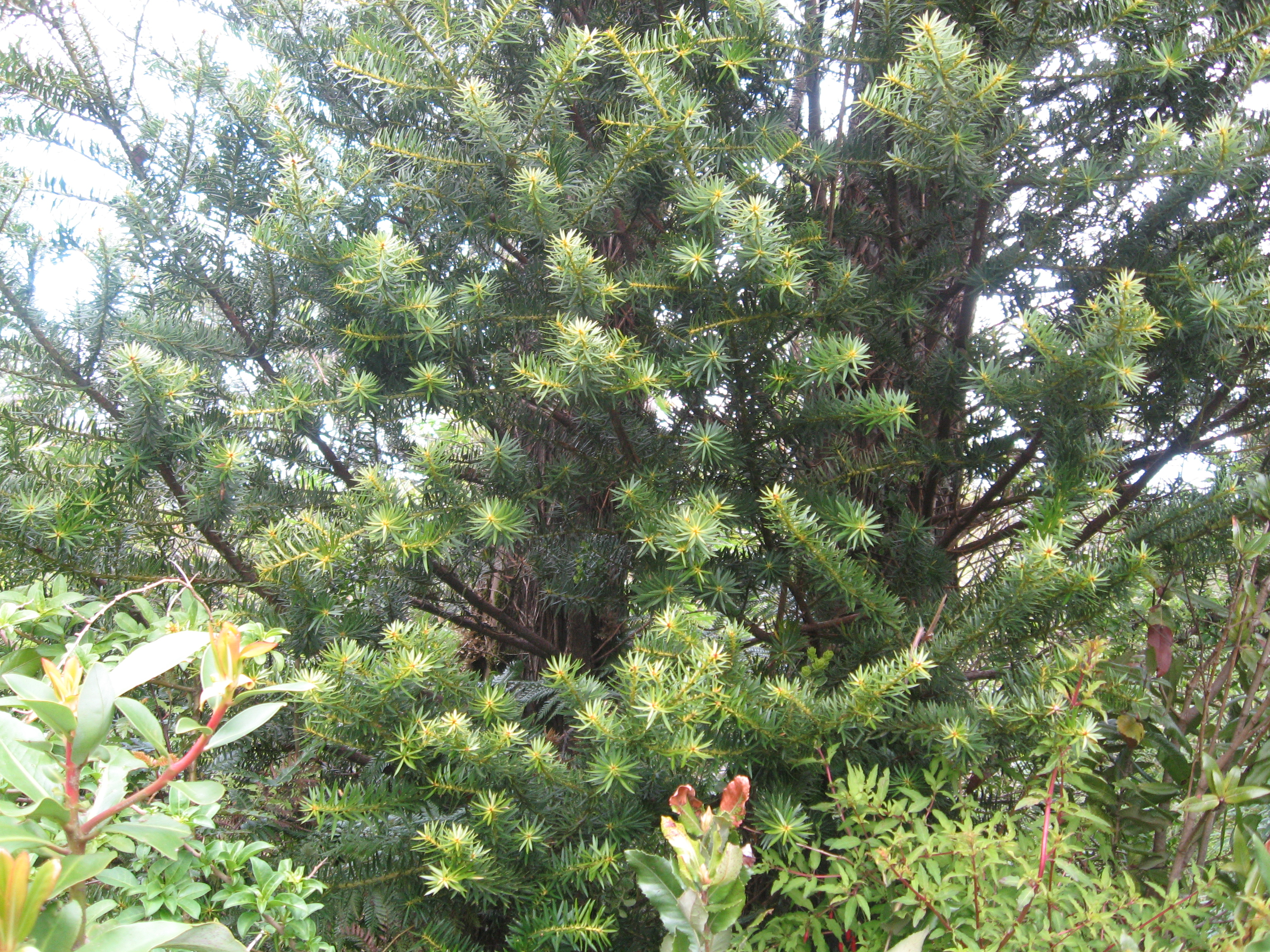 Ramas de un árbol joven de mañío hembra (Podocarpus nubigenus) en el parque Oncol, región de Los Ríos, Chile